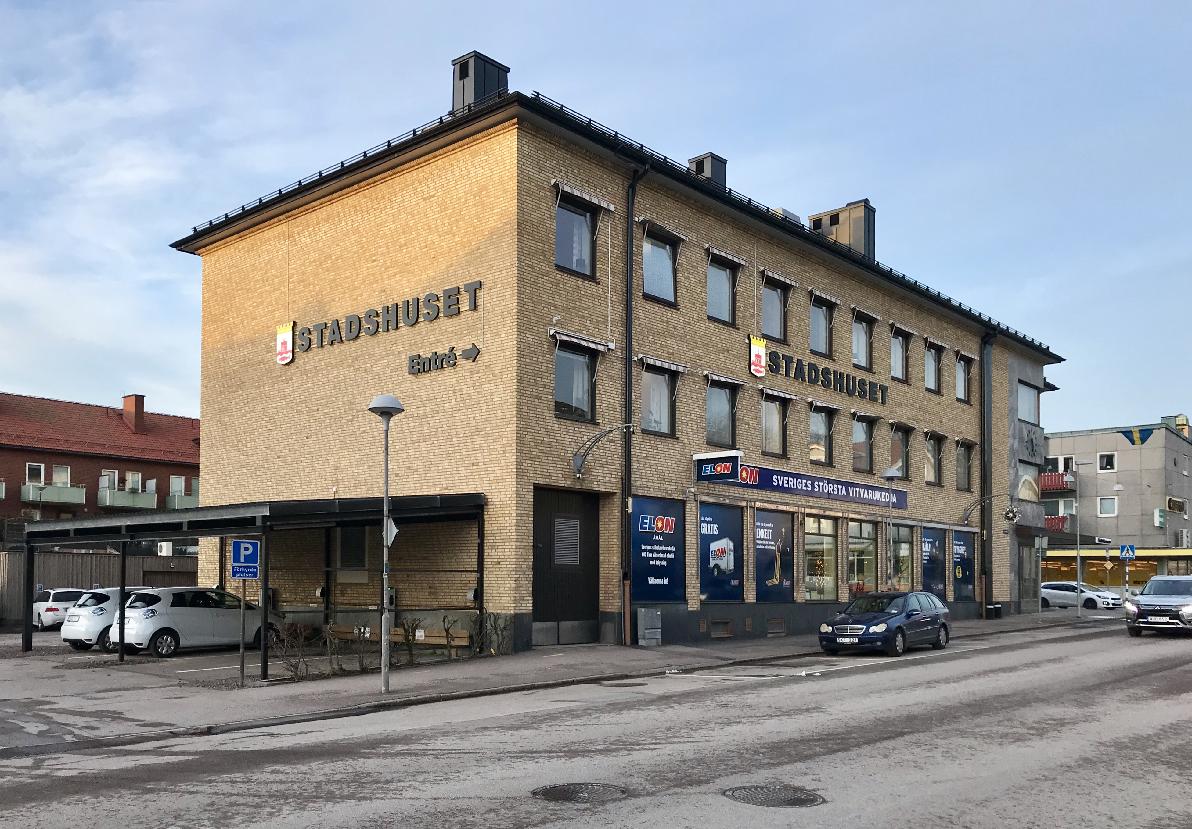 Åmåls stadshus, fasad mot Hjeltegatan. Vitvaruhuset Elon i bottenvåningen. Arkitekt: Gotthard Ålander